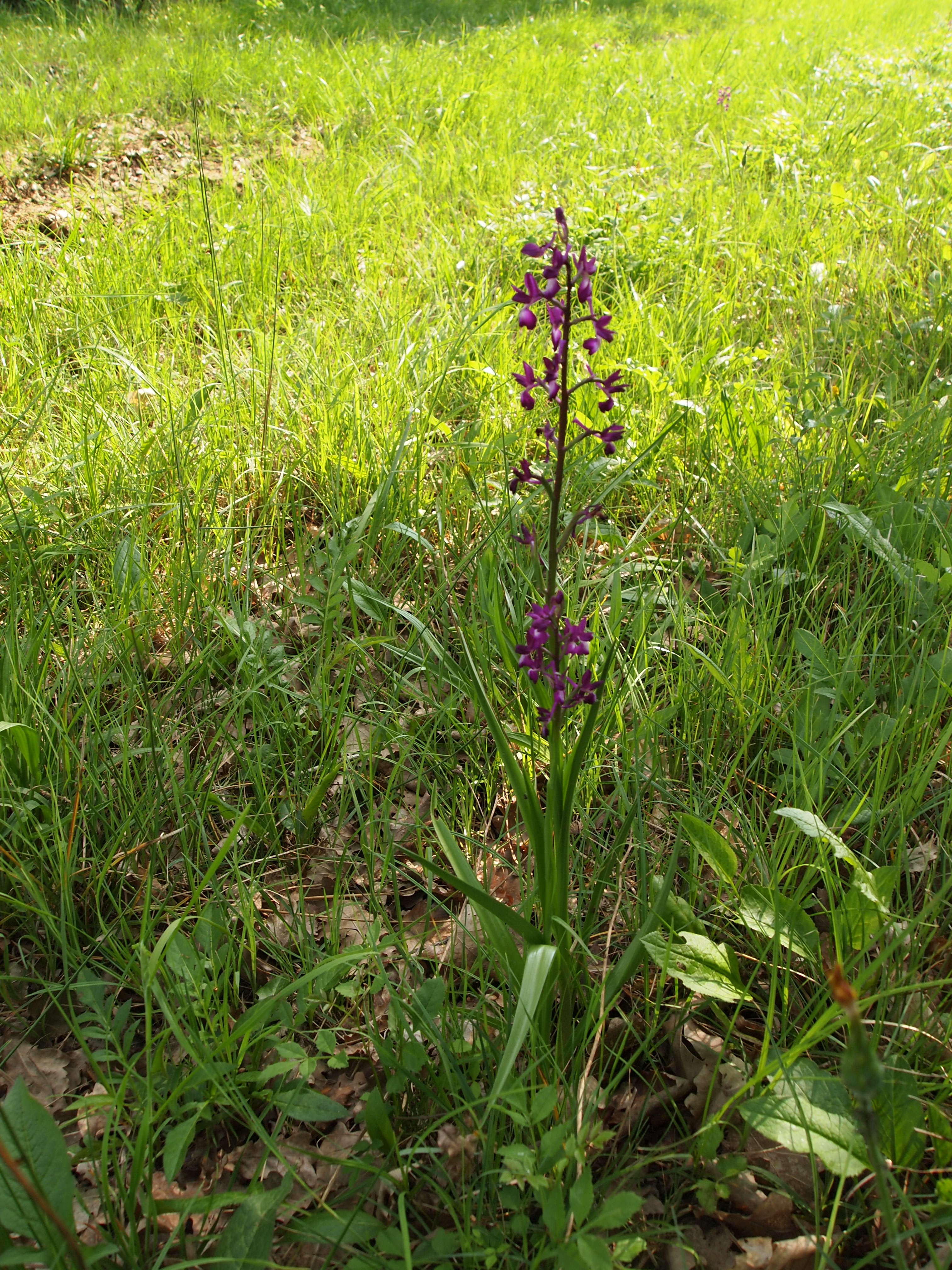 Anacamptis laxiflora à Cherves-Richemont, en Charente, en France,dans l'allée cavalière de la forêt du Rain, zone humide